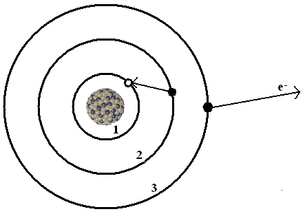 rysunek przedstawiający efekt Augera